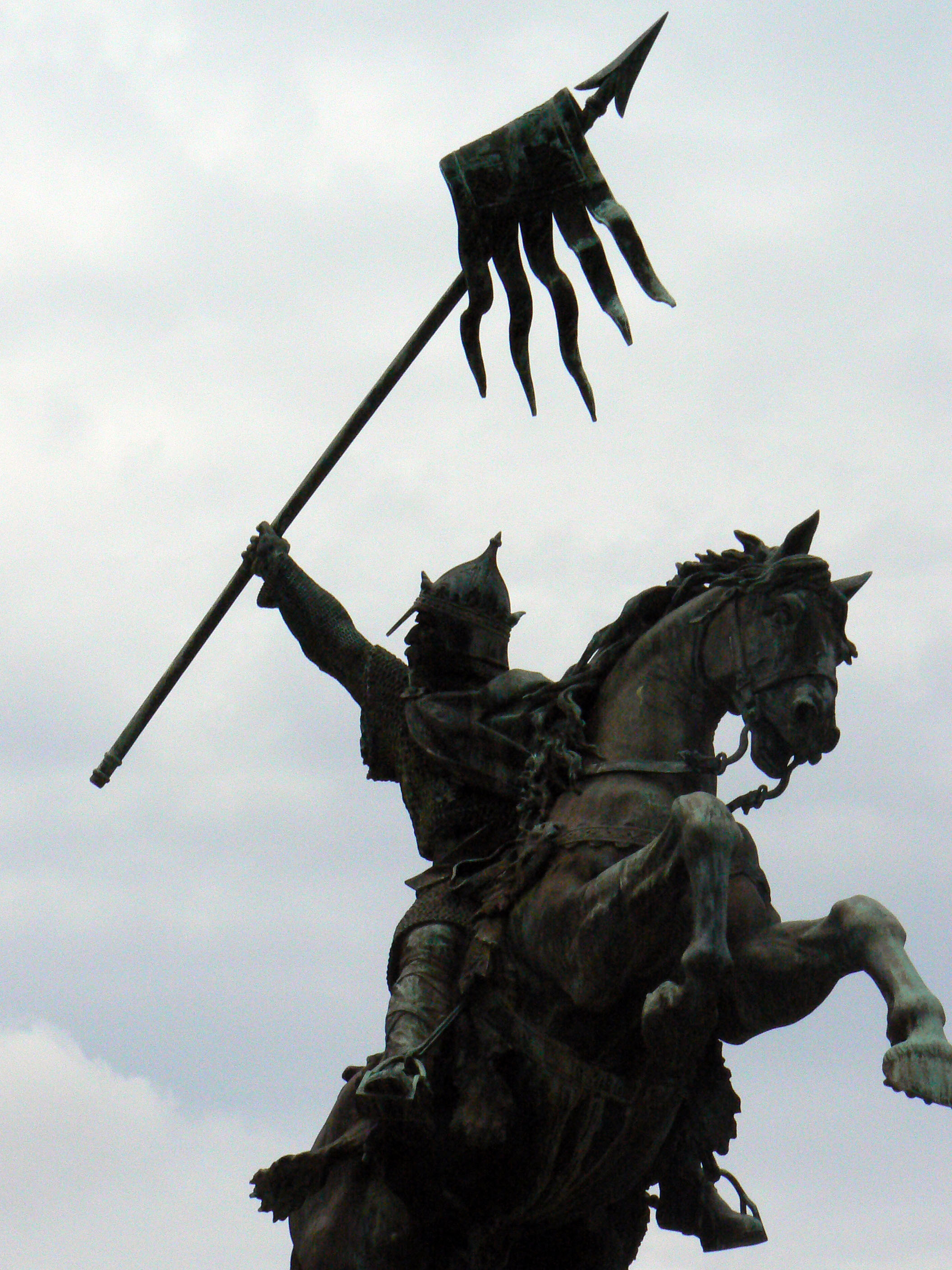 Statue de Guillaume le Conquérant devant la mairie de Falaise (Calvados, France), Rochet sculpteur, Thiébaut fondeur